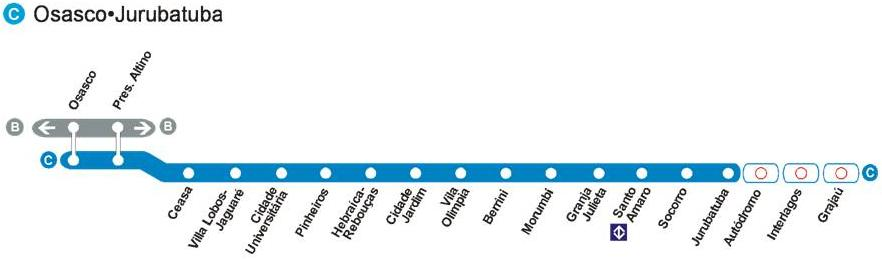 Line C - CPTM